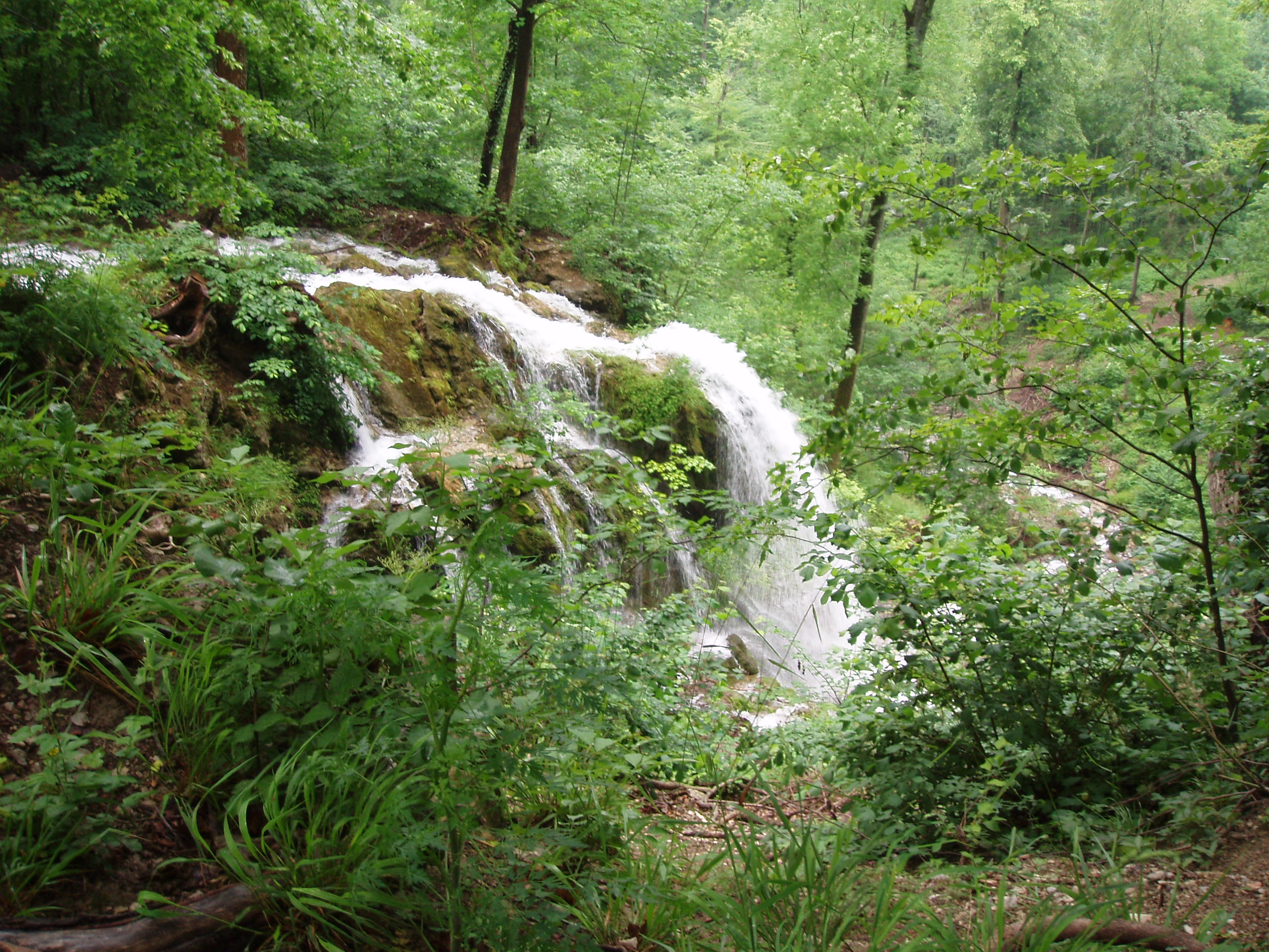 Neidlinger Wasserfall, Schwäbische Alb, Baden-Württemberg, Deutschland